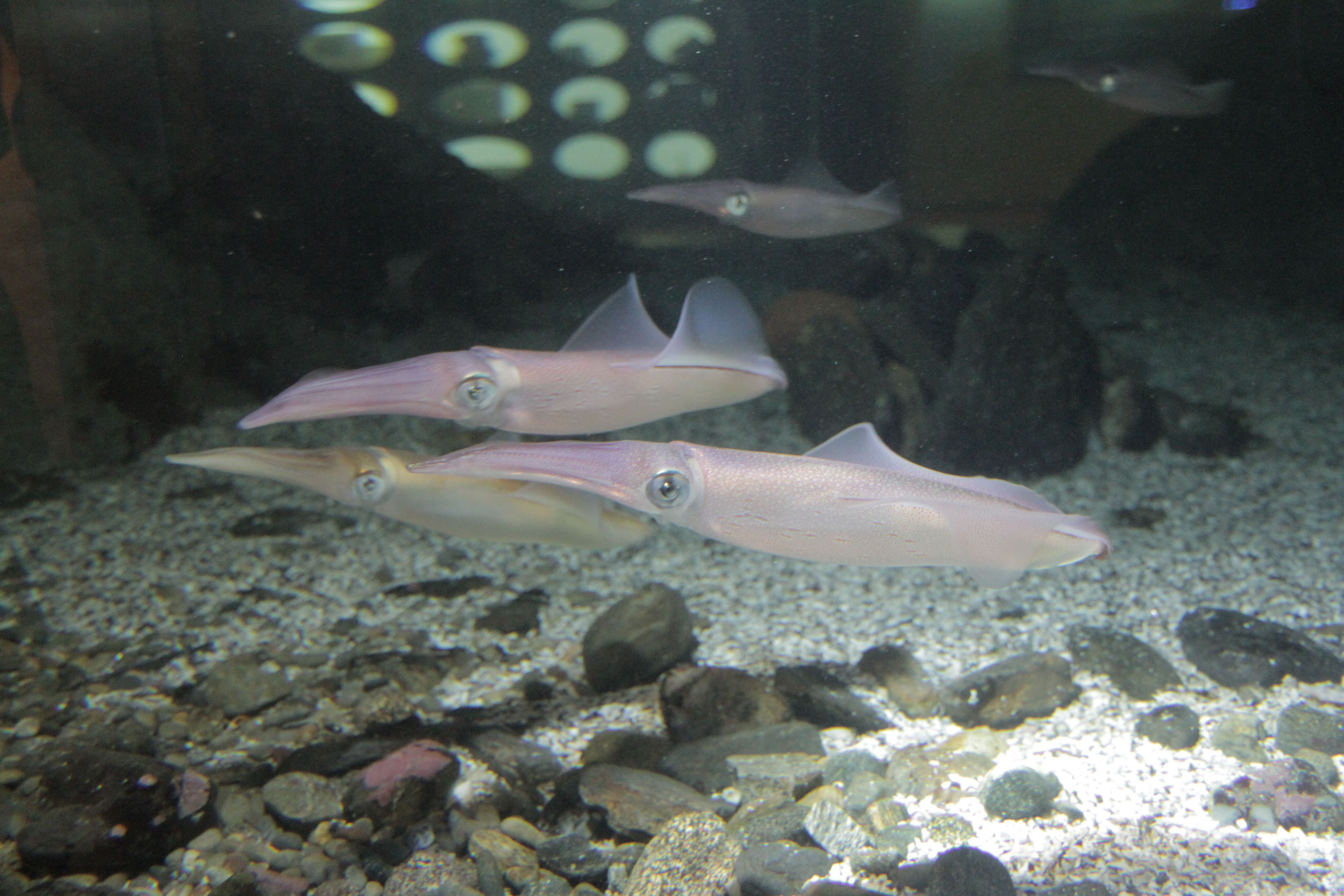 Por primera vez el Aquarium Finisterrae de A Coruña muestra a sus visitantes un espectáculo natural inédito en un acuario: una docena de ejemplares de la especie 'Loligo vulgaris', el calamar o chipirón de las costas gallegas. Más información